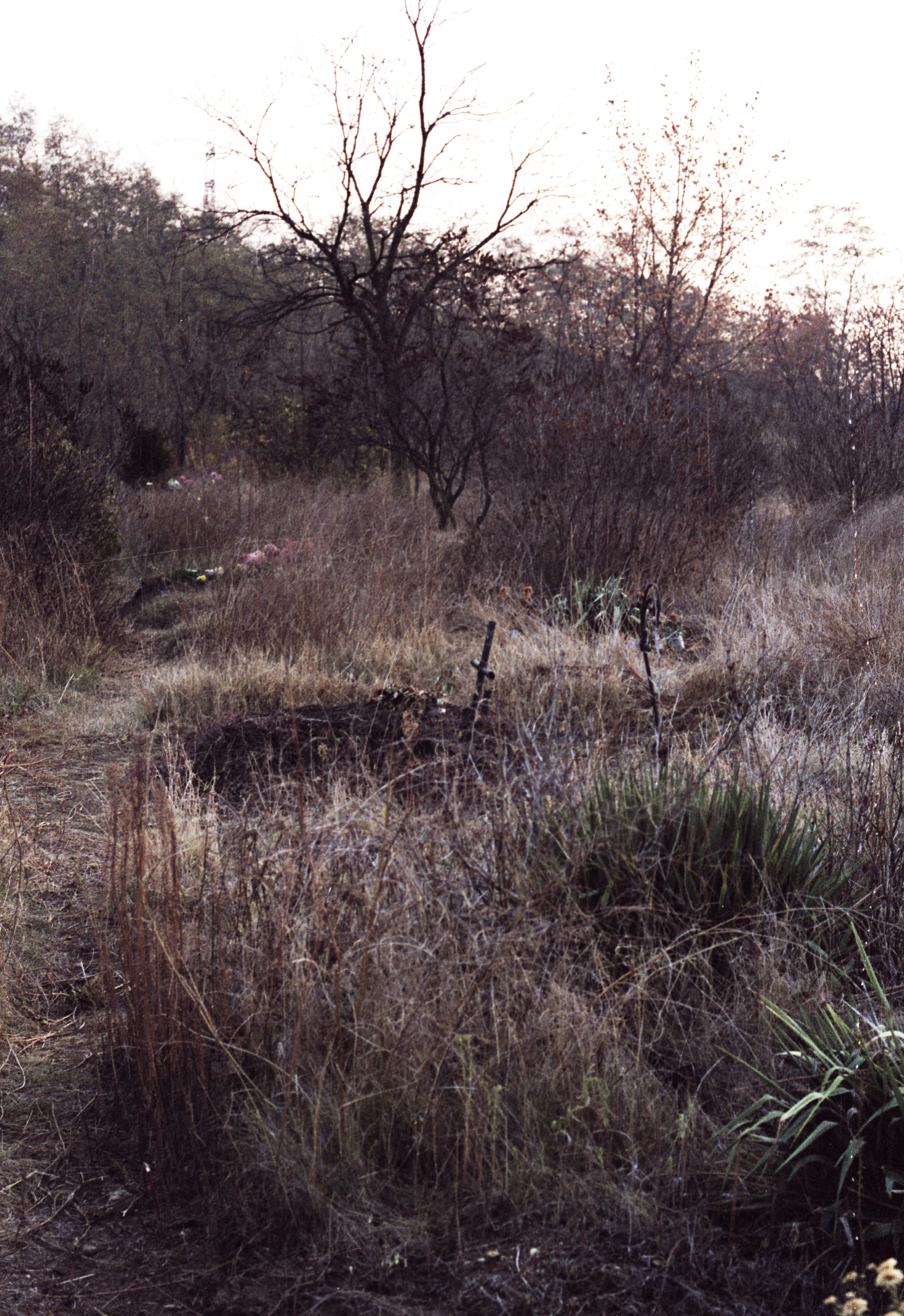 Új Köztemető, 301-es parcella. Location: Hungary, Budapest X. Tags: colorful, grave, Budapest, cemetery Title: Új Köztemető, 301-es parcella.